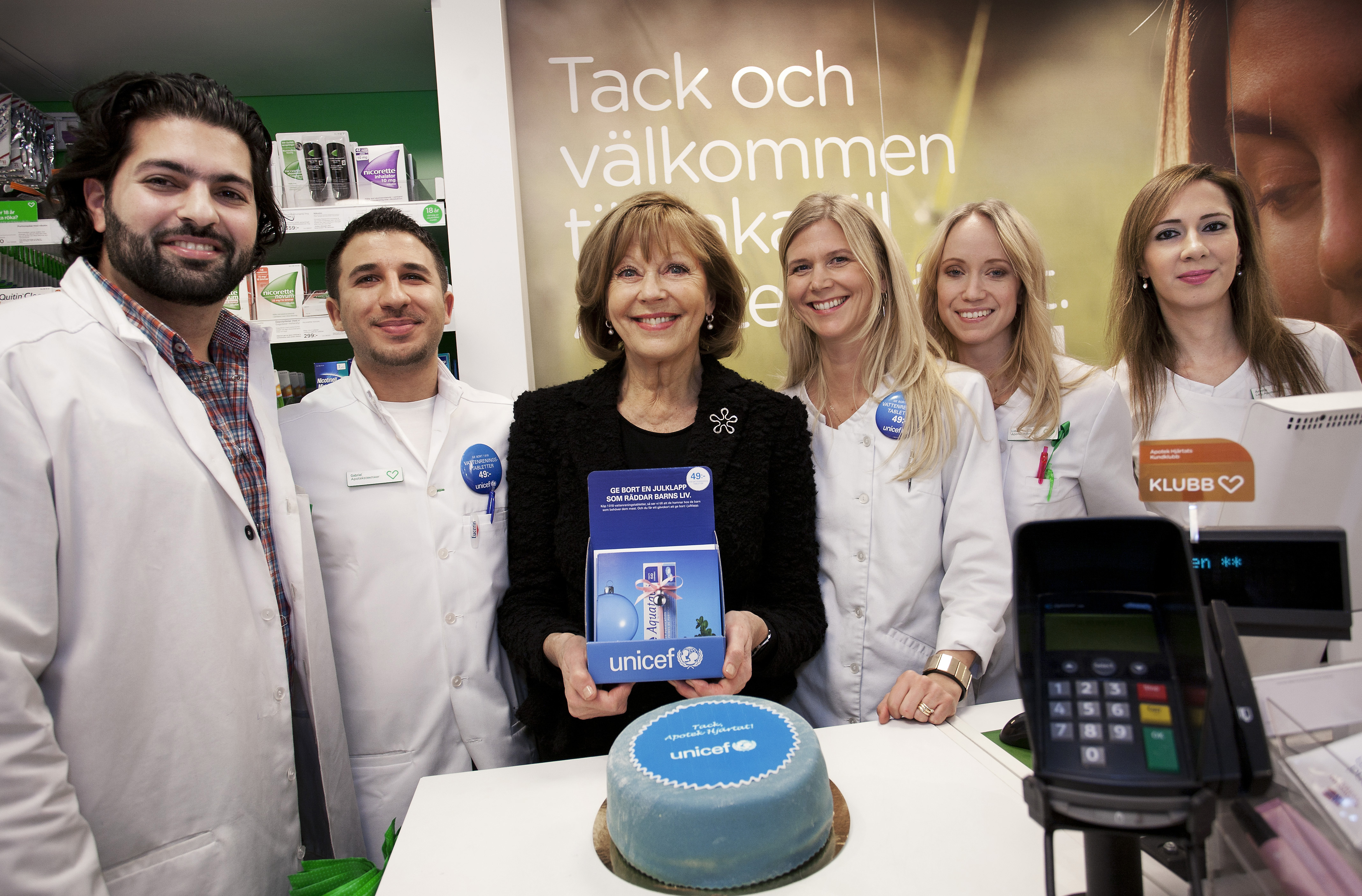 Tillsammans med Unicef kan vi rädda barns liv. Unicefs ambassadör Lill Lindfors hälsar på hos Apotek Hjärtat Åhléns City i Stockholm, där våra engagerade medarbetare har sålt massor av Unicefs gåvokort med vattenreningstabletter. Från vänster: apotekschef Farzad Salehi, Gabriel Malke, Lill Lindfors, Lisa Norberg, Linda Kling och Armita Kamyar.